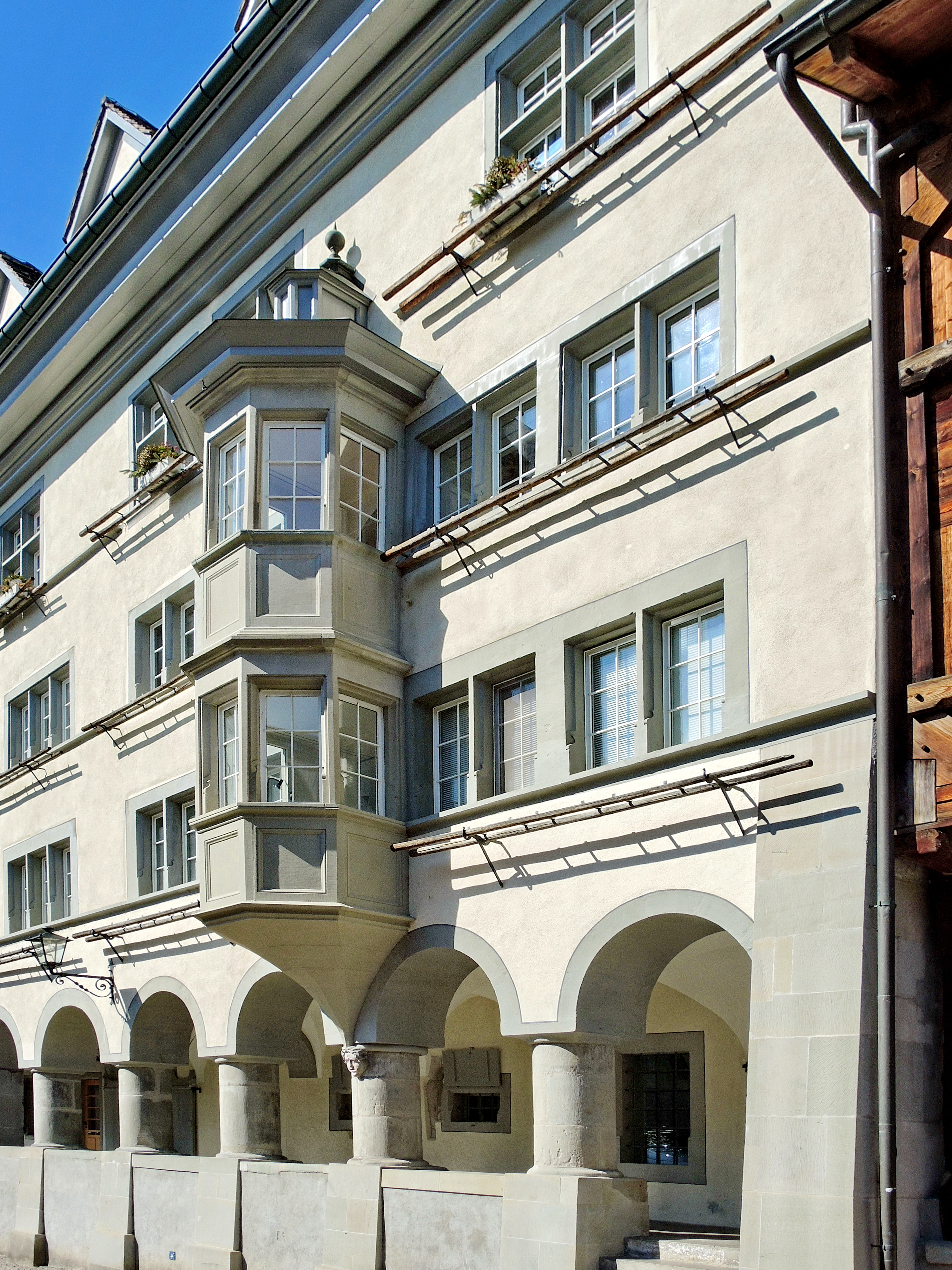 Bleulerhaus, Hintergasse in Rapperswil (Switzerland)